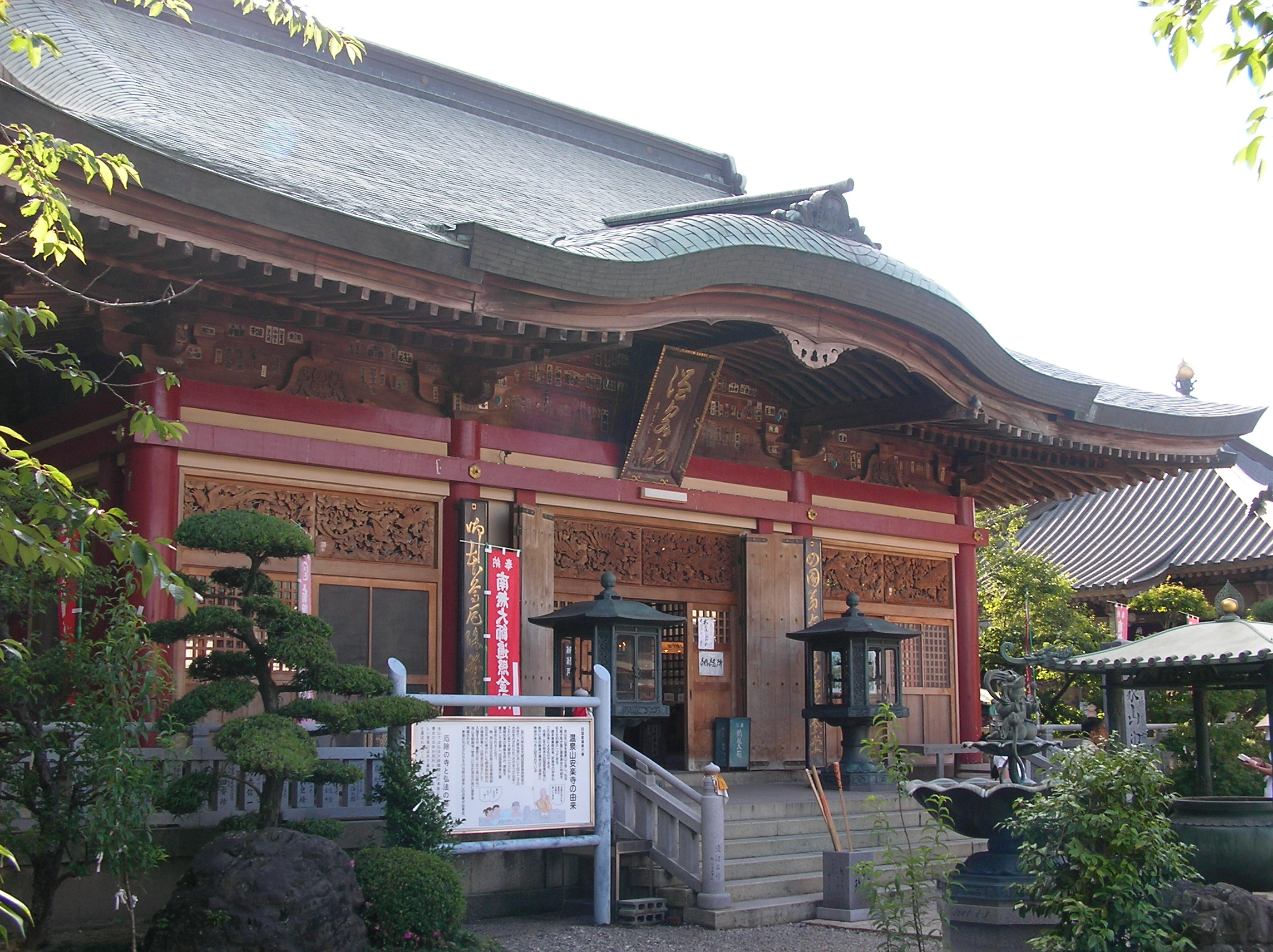 onsenzan-anrakuji-main